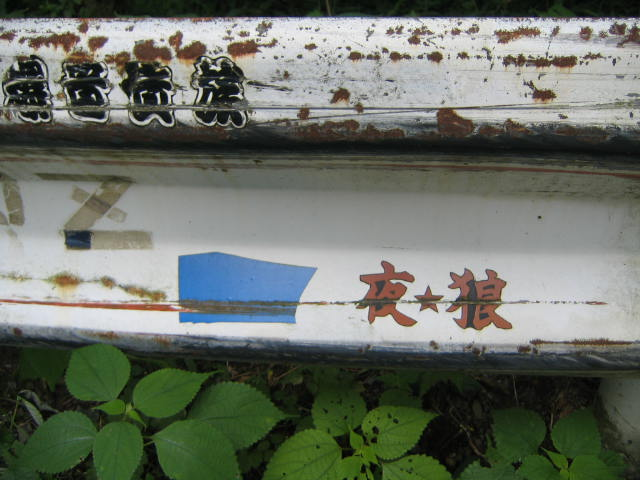 道志街道のガードレールに貼られたステッカー